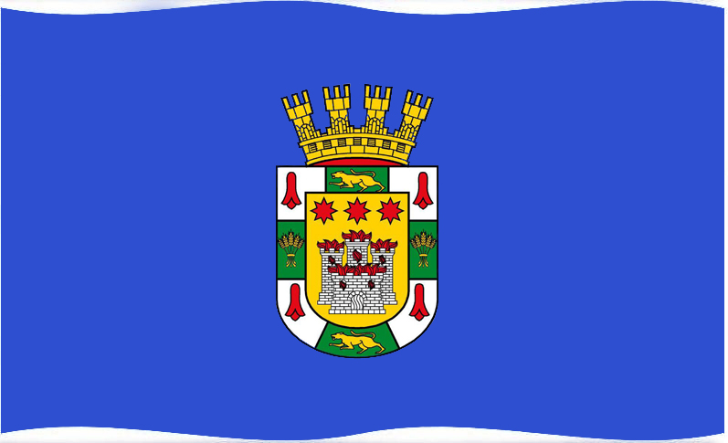 La Bandera de la ciudad tiene un fondo azul y en centro posee el escudo de la ciudad